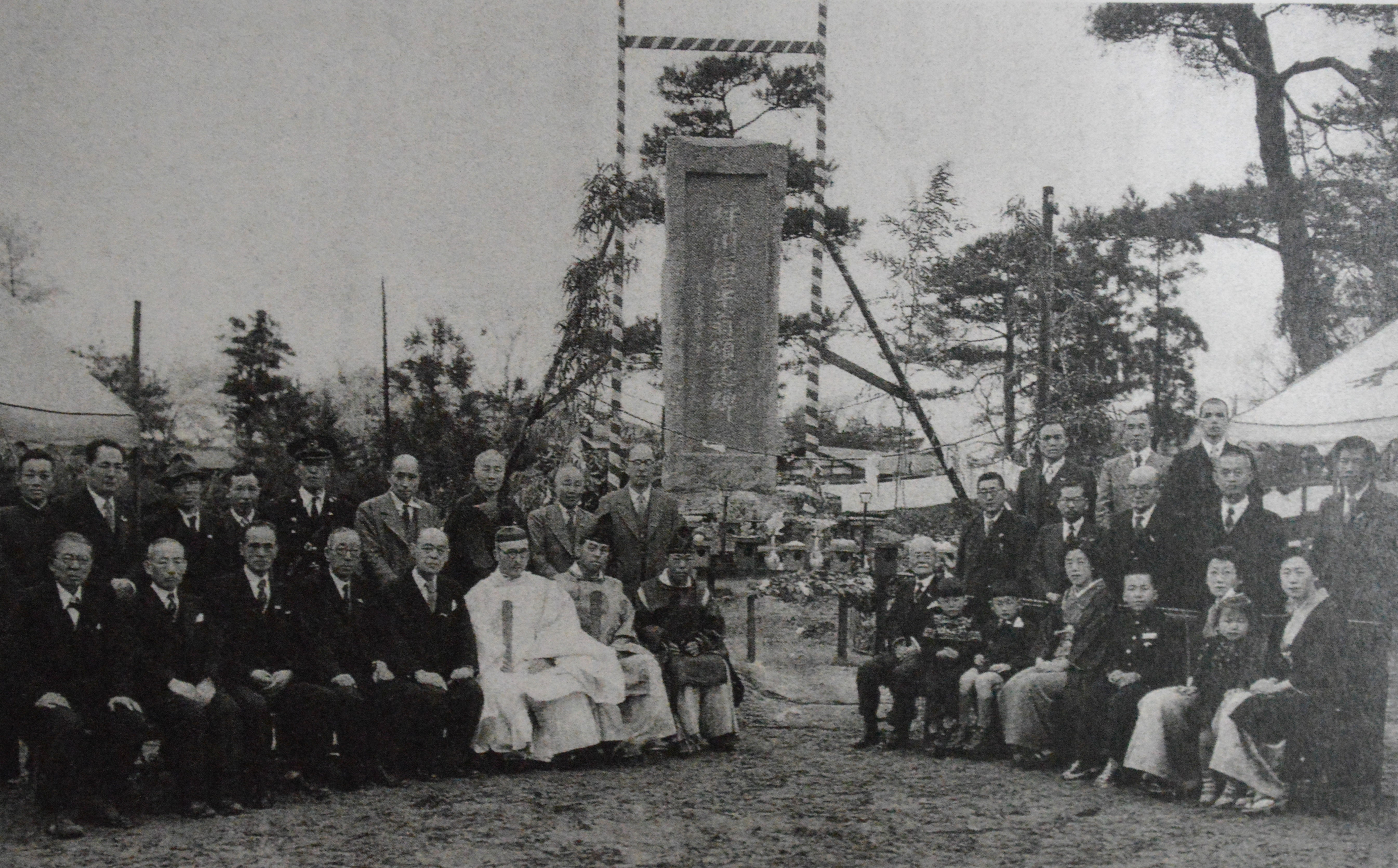 新潟県新発田市で挙行された「坪川洹平翁頌徳碑」の竣工記念式典。1954年4月。